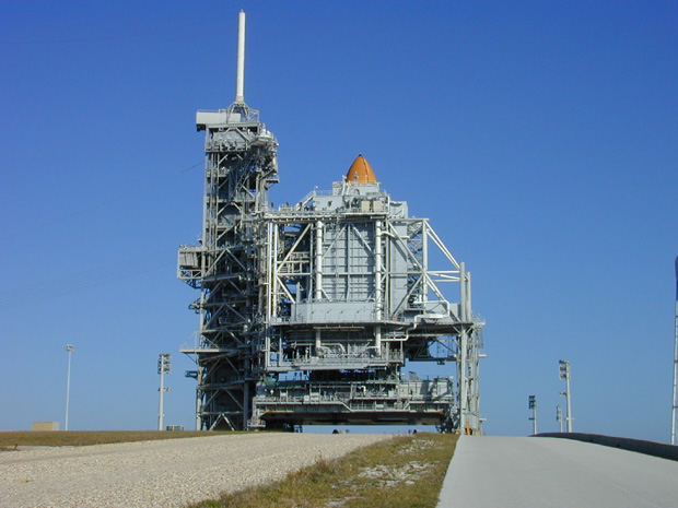 Foto tomada de